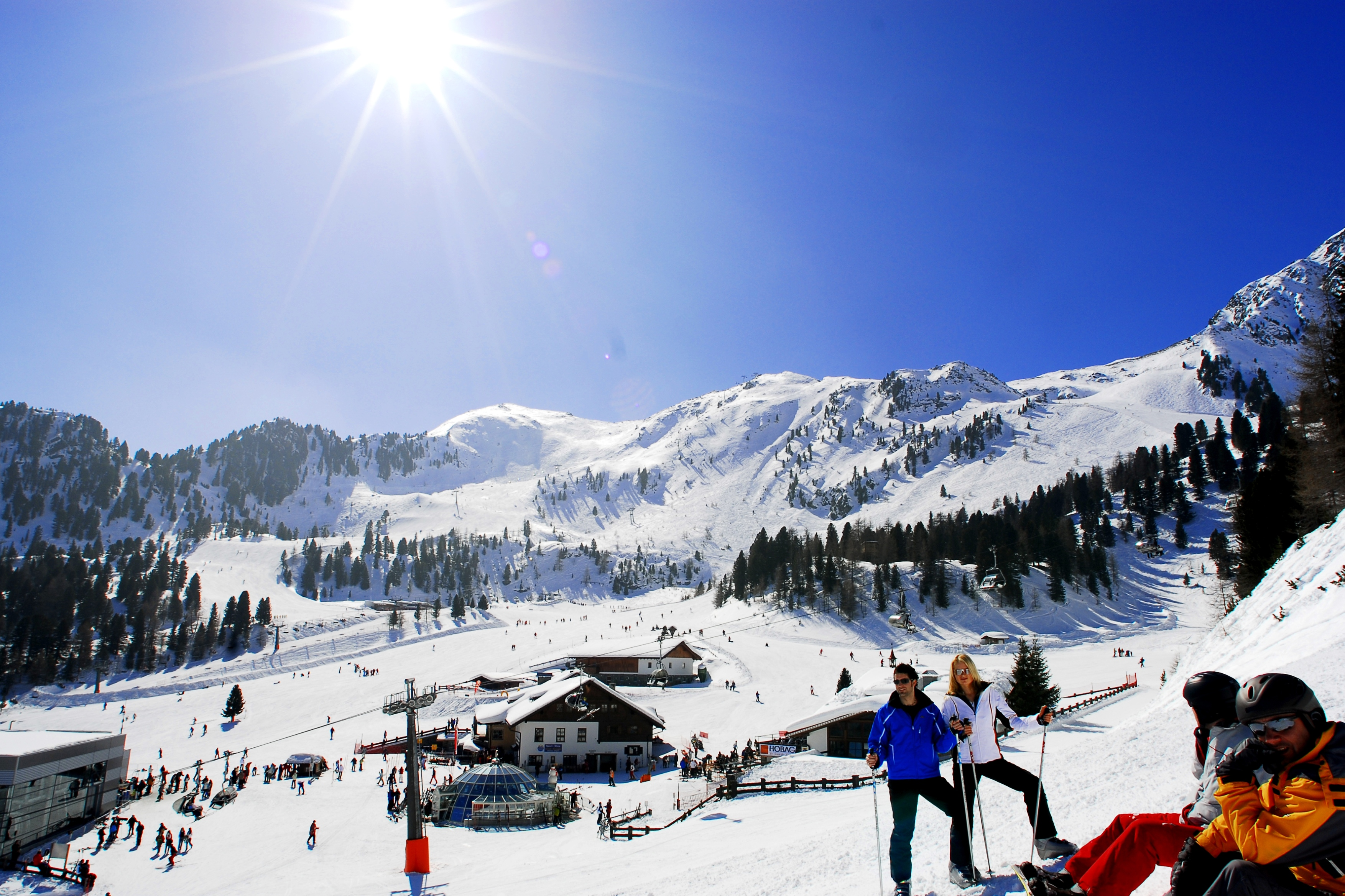 Speikboden-Gebiet von der Piste Seenock aus gesehen